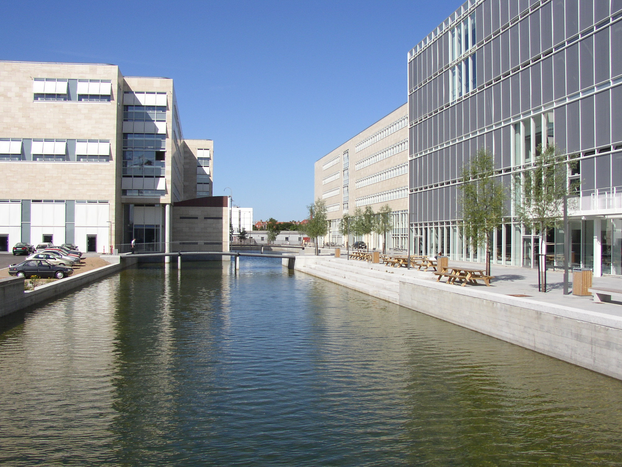 Københavns Universitet Amager (University of Copenhagen Amager)